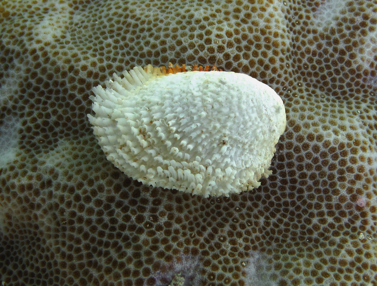 Chama jukesi à la Réunion.